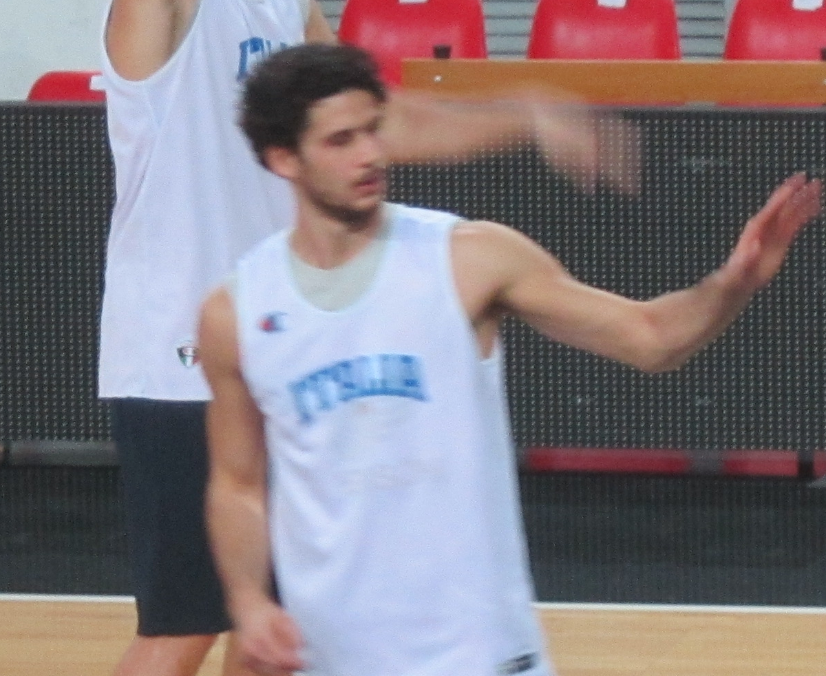 Luca Vitali nell'agosto 2011 durante un allenamento in preparazione agli Europei.